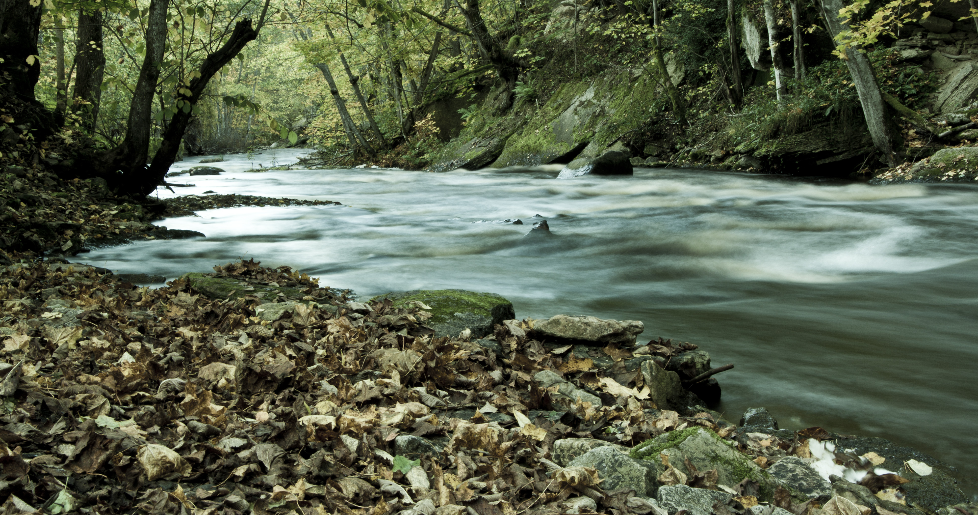 Valgejõgi